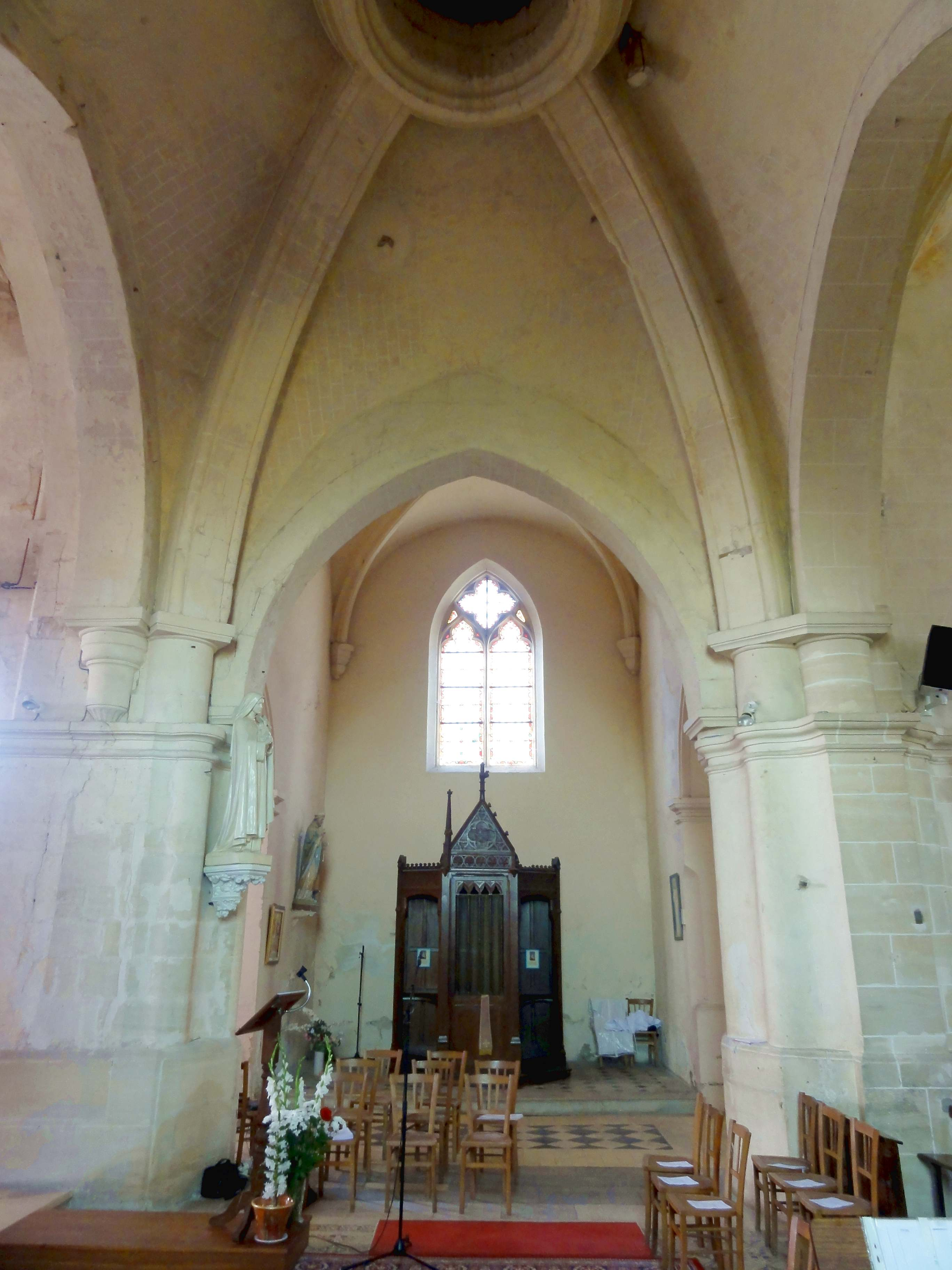 Intérieur de l'église Saint-Vaast de Nointel (voir titre).